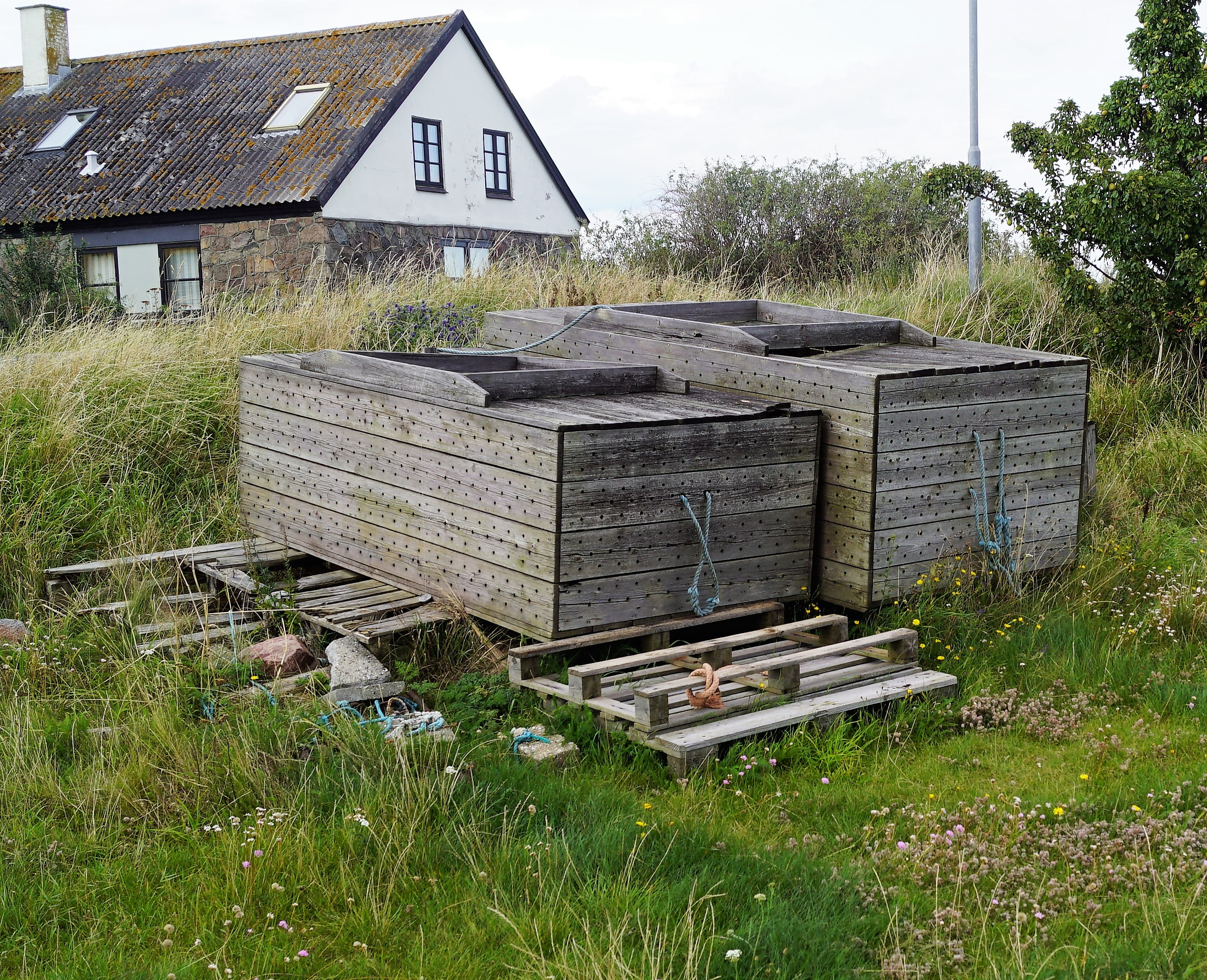 Et par hyttefade ved Langør på Samsø